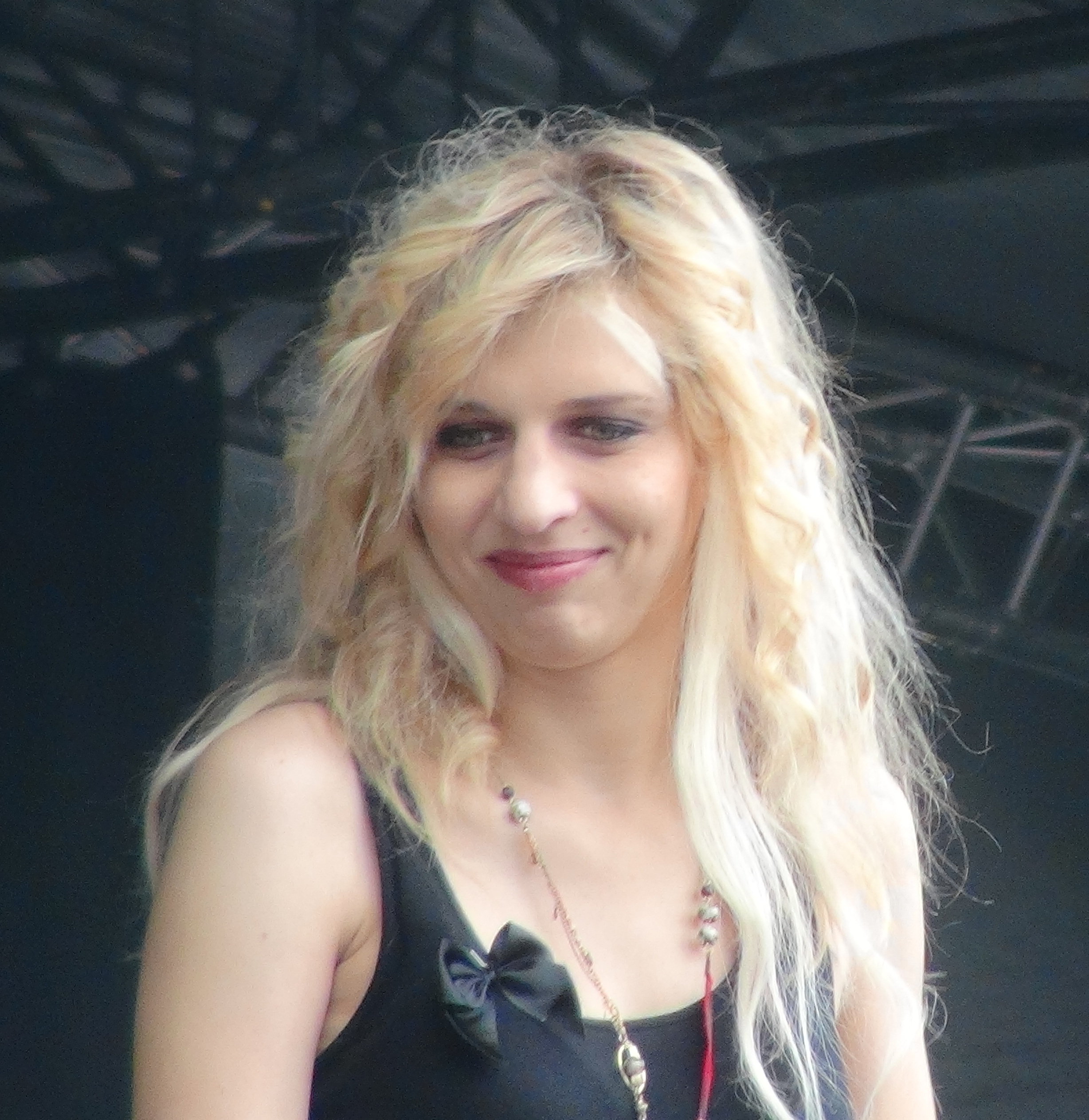 Amandine Bourgeois au festival Pic'Arts le 30-06-2012 (2)